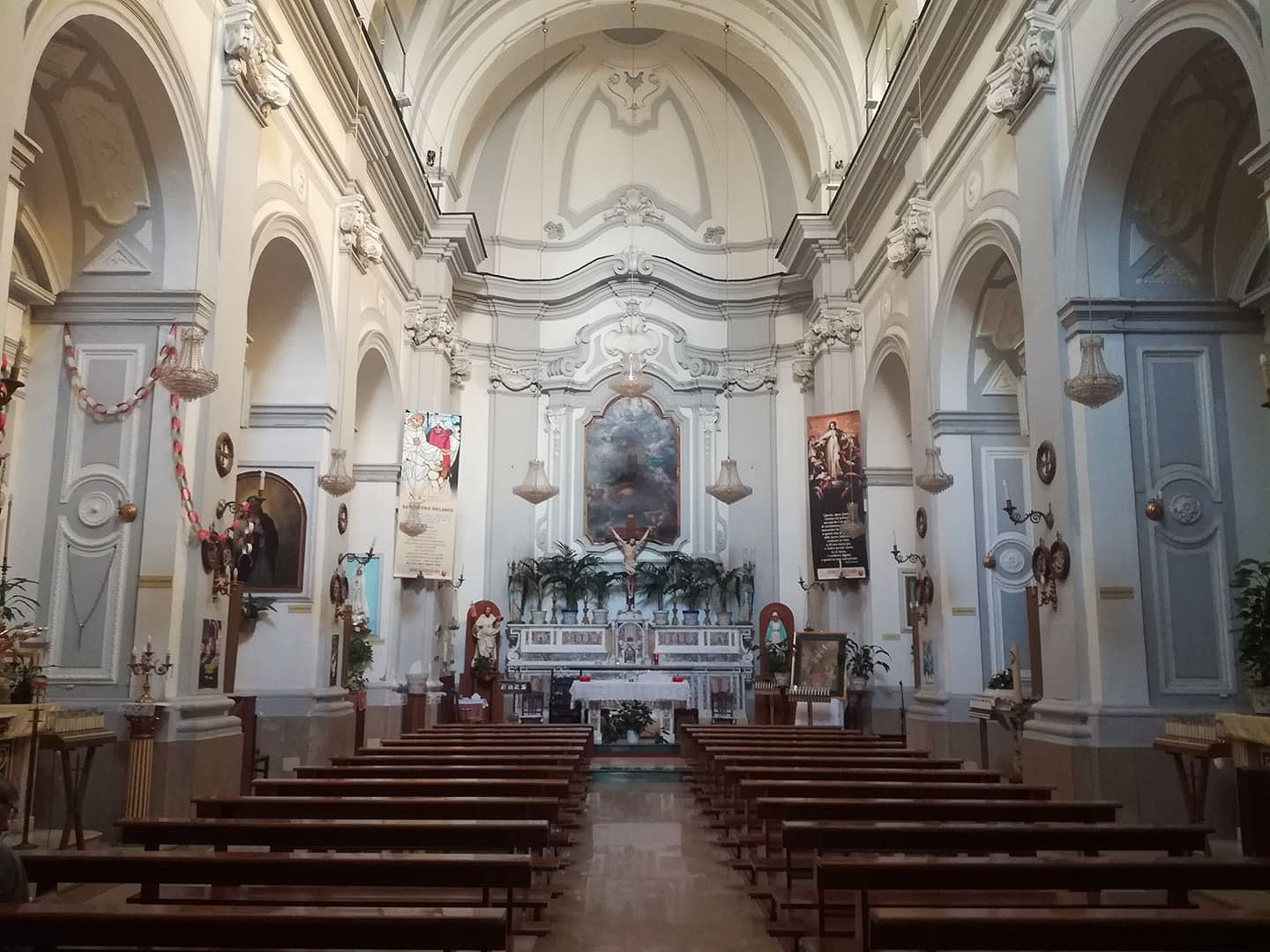 Interno; Santi Francesco e Matteo, Napoli